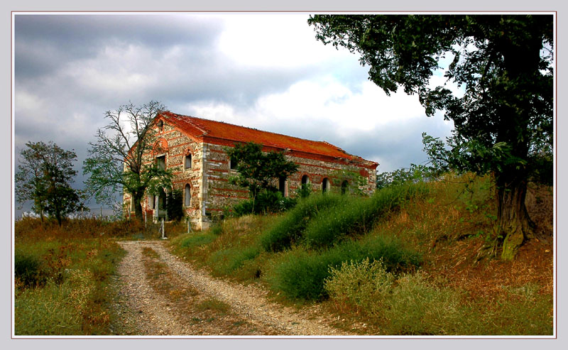 Germiyan Kilisesi